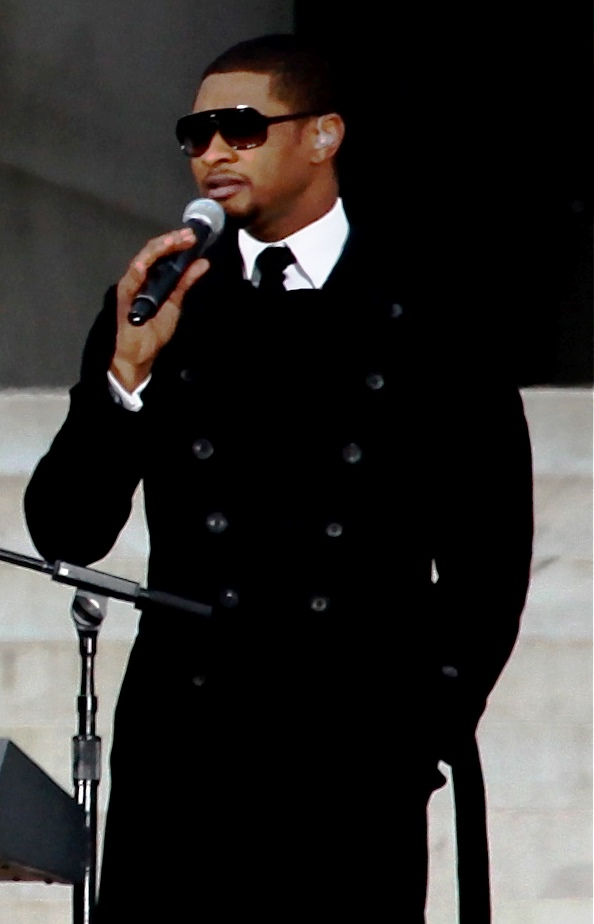 Usher in a performance of Wonder's "Higher Ground" at the We Are One: The Obama Inaugural Celebration at the Lincoln Memorial concert.